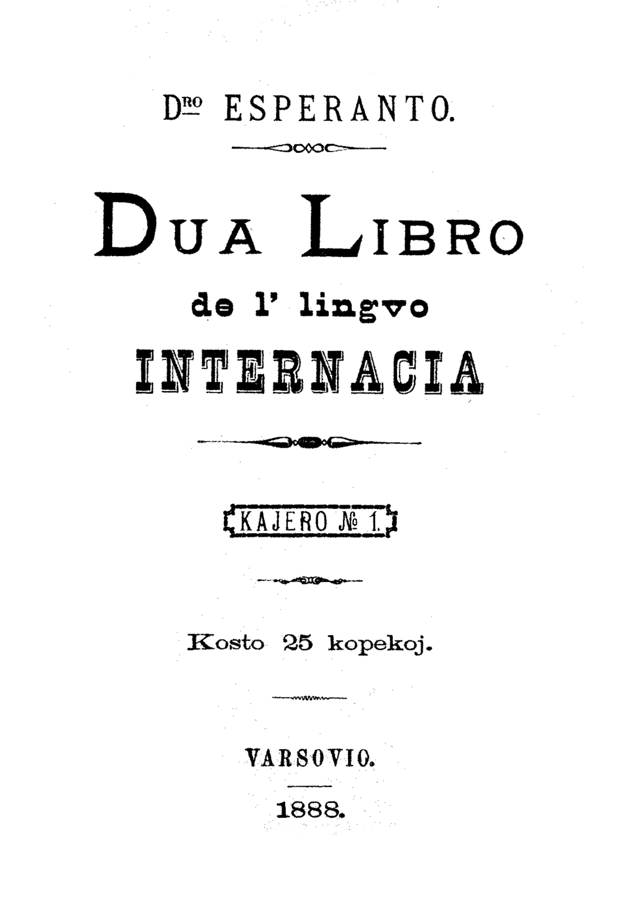 Okładka książki Dua Libro de l' lingvo internacia Ludwika Zamenhofa